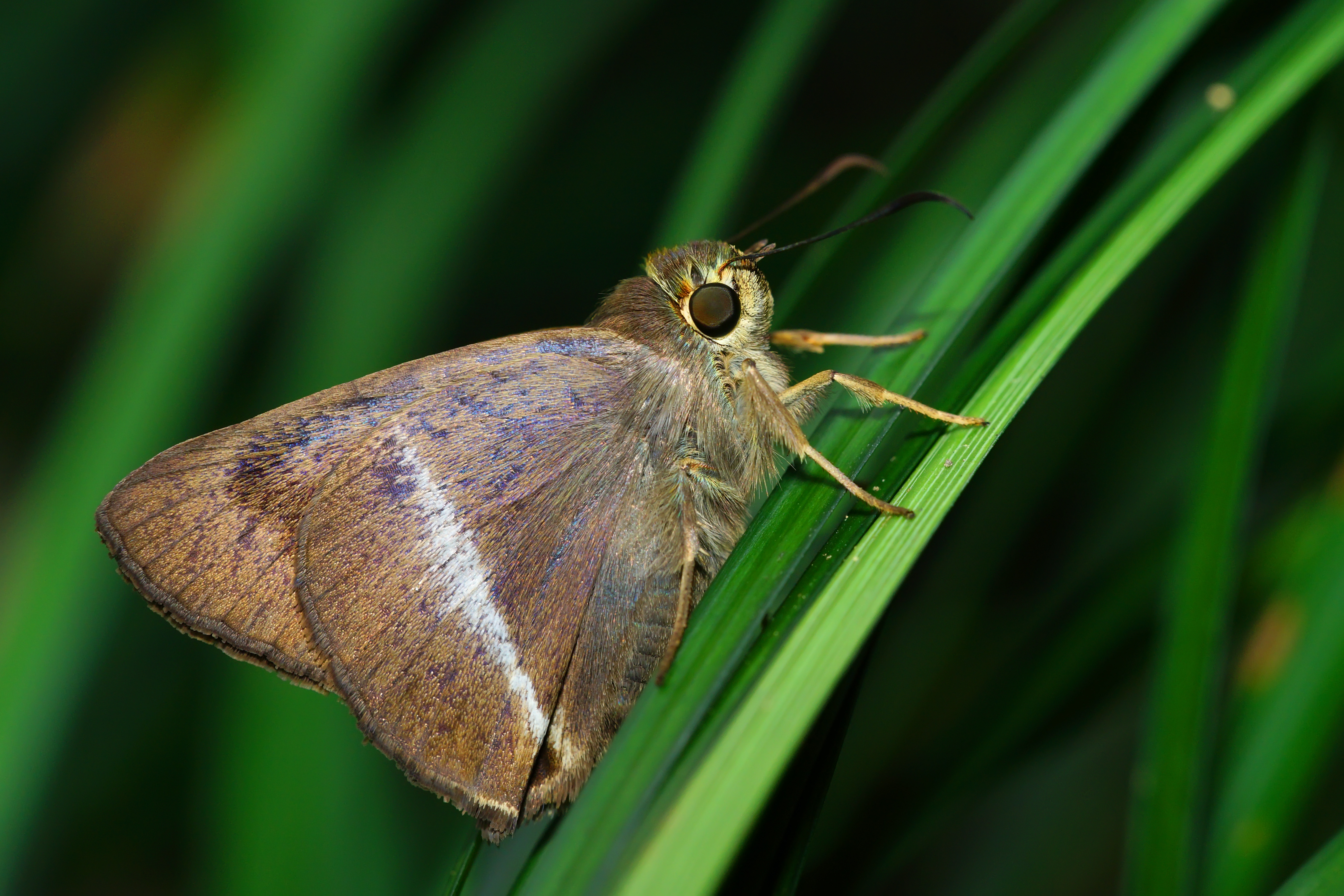 圓翅絨弄蝶（Hasora taminatus vairacana）